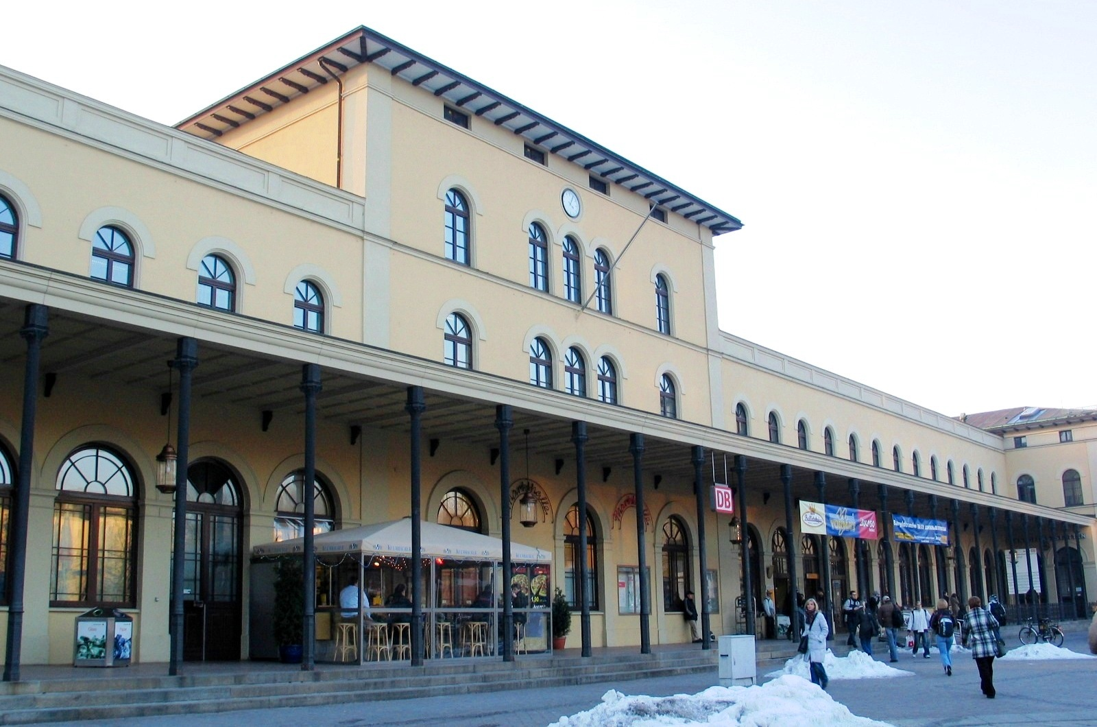 Augsburg, Bahnhofsgebäude